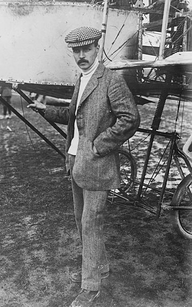 French aviator Étienne Bunau-Varilla (1890-1961). Note: Mislabelled Jean Bunau-Varilla on the original photograph.